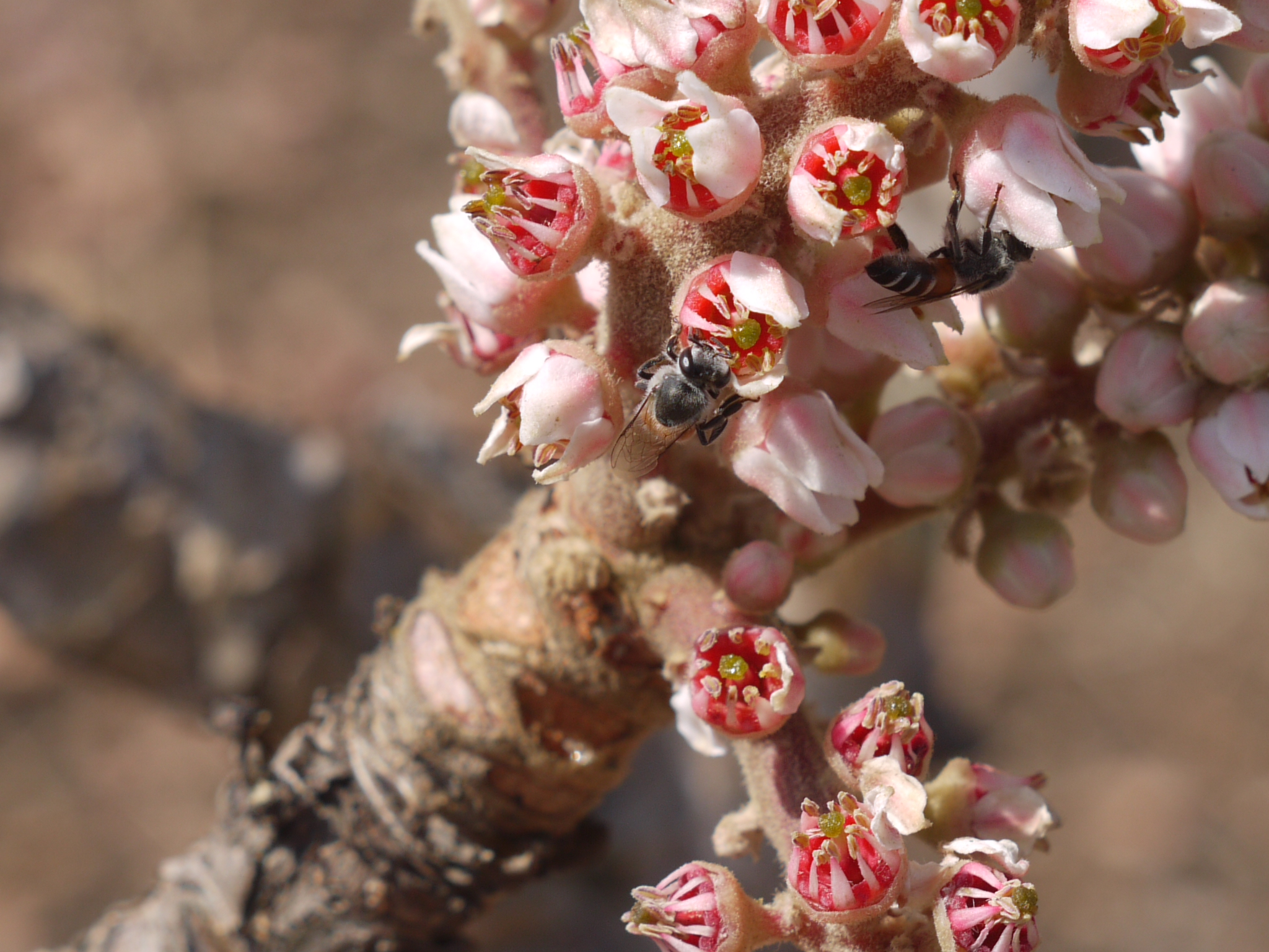 Burseraceae (incense or torchwood family) » Boswellia serrata bos-WELL-ee-a -- named for John Boswell, Scottish botanist and FRCP of Edinburgh sair-AY-tuh or ser-RAT-uh -- toothed like a saw commonly known as: Indian frankincense tree, Indian olibanum tree, salai tree • Gujarati: સાલેડી saaledi, સલાઈ ગૂગળ salaai gugul • Hindi: शल्लकी shallaki • Kannada: ಗುಗ್ಗುಳ ಮರ guggula mara • Malayalam: കുങ്ങില്യം kungilyam • Marathi: धुपाळी dhupali, धूपसाळी dhupasali, कुरुंद kurunda, सालफळी salaphali, साळई salai, साळी sali • Oriya: salai • Pali: सल्लकी sallaki • Punjabi: ਸਾਲ੍ਹੇ salhe, ਸਾਲਹੀ salhi • Sanskrit: भीषण bhishan, गुग्गुल guggula, हस्तिनशना hastinashana, पालंक palank, पार्वती parvati, ऱ्हादिनी hradini, कुरुन्द kurunda, सल्लकी sallaki, शल्लकी shallaki, स्रुवा sruva • Tamil: குமஞ்சம் kumancam, குங்கிலியம் kunkiliyam, மரத்துவெள்ளை marattu-vellai, பறங்கிச்சாம்பிராணி paranki-c-campi-rani, வெள்ளிக்கீரை vellai-k-kirai • Telugu: గుగ్గిలము guggilamu, పరంగిసాంబ్రాణిచెట్టు parangi-sambrani-chettu, సల్లకి sallaki ... the resin obtained from this tree is commonly known as: Indian olibanum, Indian frankincense, Konkani resin • Arabic: لبان luban • Hindi: कुंदर kundar, लोबान loban, मकन्द makand, मकुन्द makund • Kannada: ಚಿಲಕದೂಪ chilakadupa, ಧೂಪ dhupa, ಗುಗ್ಗುಳ guggula, ಹಾಲು ಮಡ್ಡಿ haalu maddi, ಲೋಬಾನ lobaana, ಪರಮ್ಗಿ ಸಾಮ್ಬ್ರಾಣಿ paramgi saambraani • Konkani: लोभान lobhan • Marathi: लोभान lobhan • Persian: گنده فيروزه gandha firoza, لوبان loban • Punjabi: ਲੋਬਾਣ loban • Sanskrit: द्विज dvija, कुन्दुर kundur, कुन्दुरु kunduru, मुकुन्दः mukundah, पालंकी palanki, पालंक्या palankya, सुरभी surabhi, तुरुष्क turushka • Telugu: కుందురువు kunduruvu • Urdu: لوبان loban Endemic to: India References: Flowers of India • NPGS / GRIN • DDSA